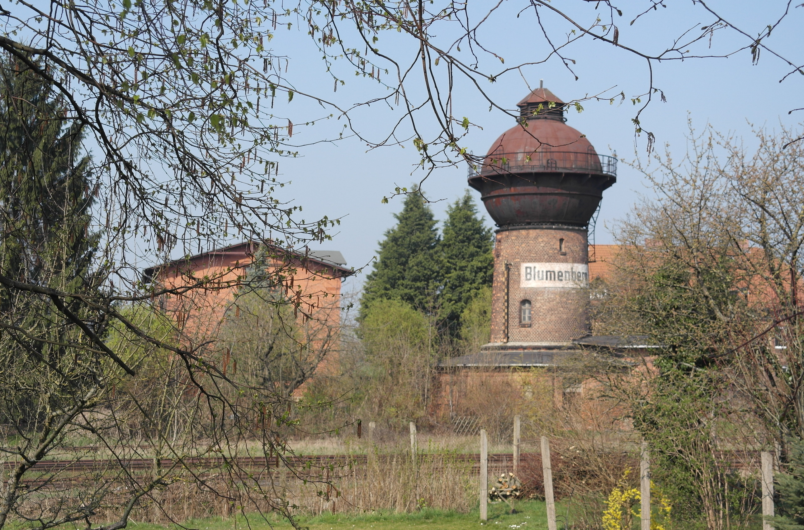 Bahnhof Blumenberg, Wasserturm und Wohnhaus